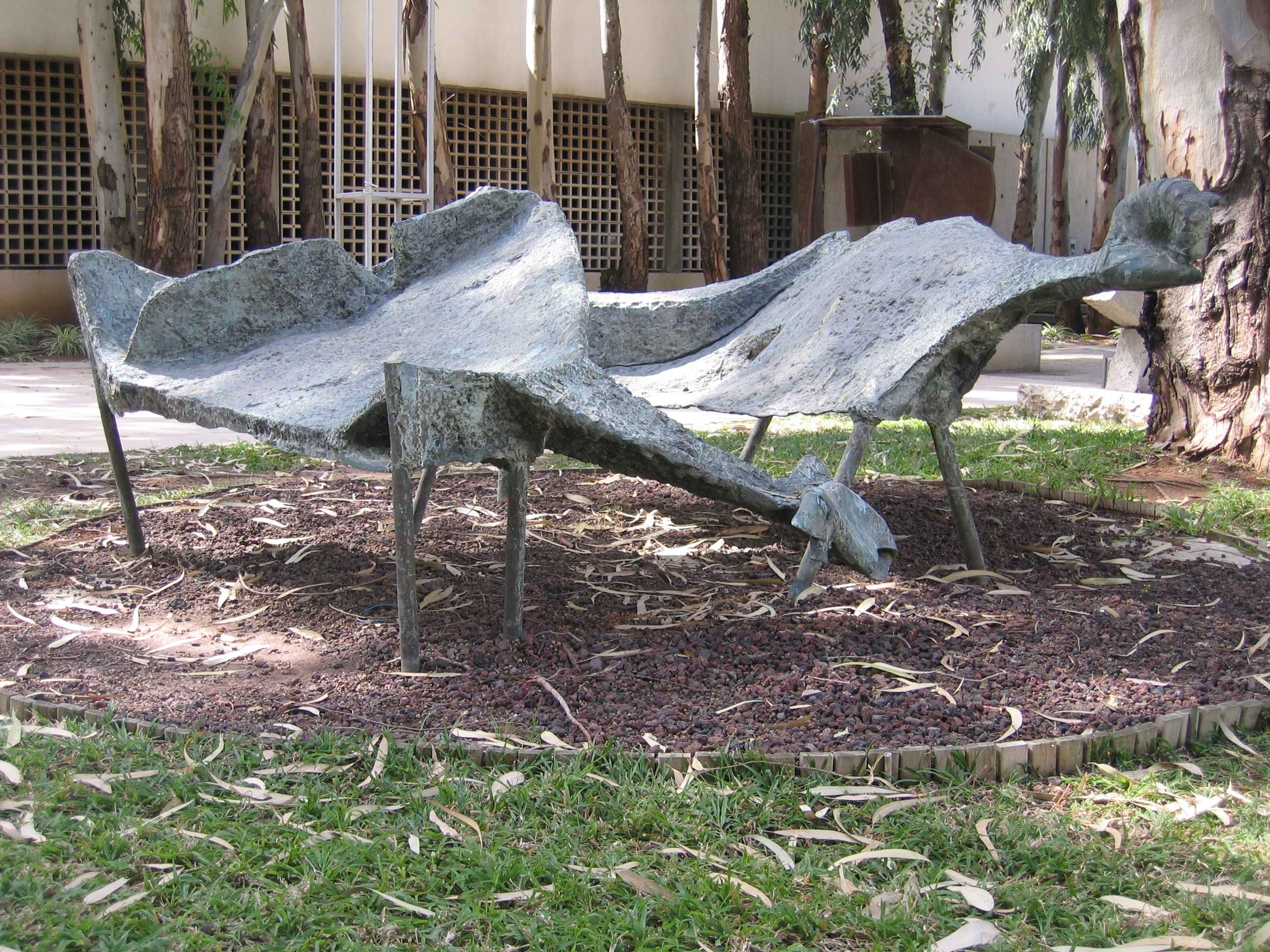 Sculpture